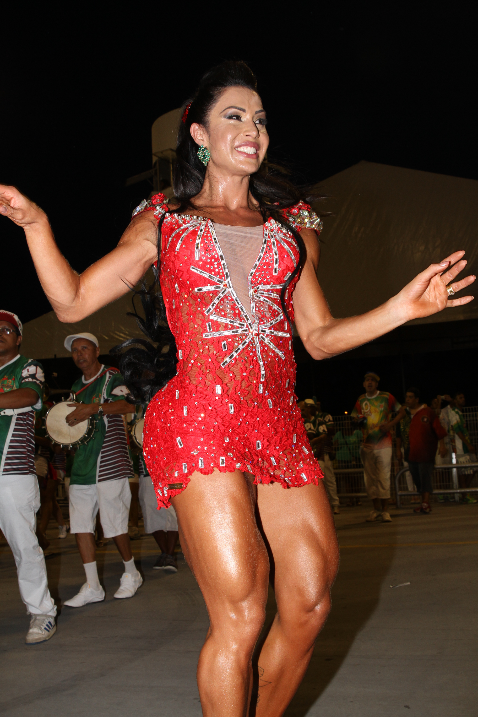 Ensaio técnico da G.R.E.S. X-9 Paulistana- 17/01/2015